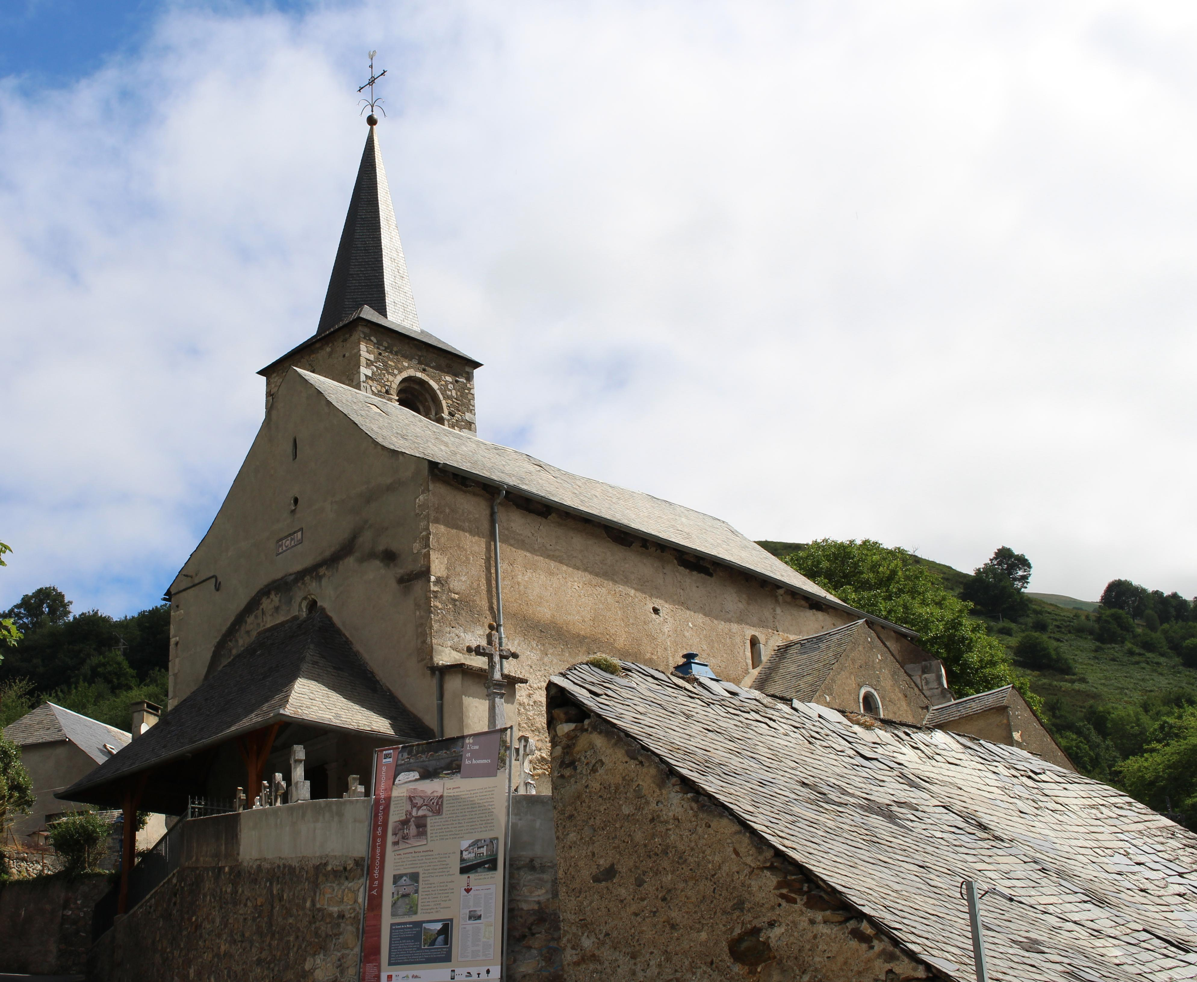 Église Notre-Dame-de-l'Assomption d'Ilhet (Hautes-Pyrénées)